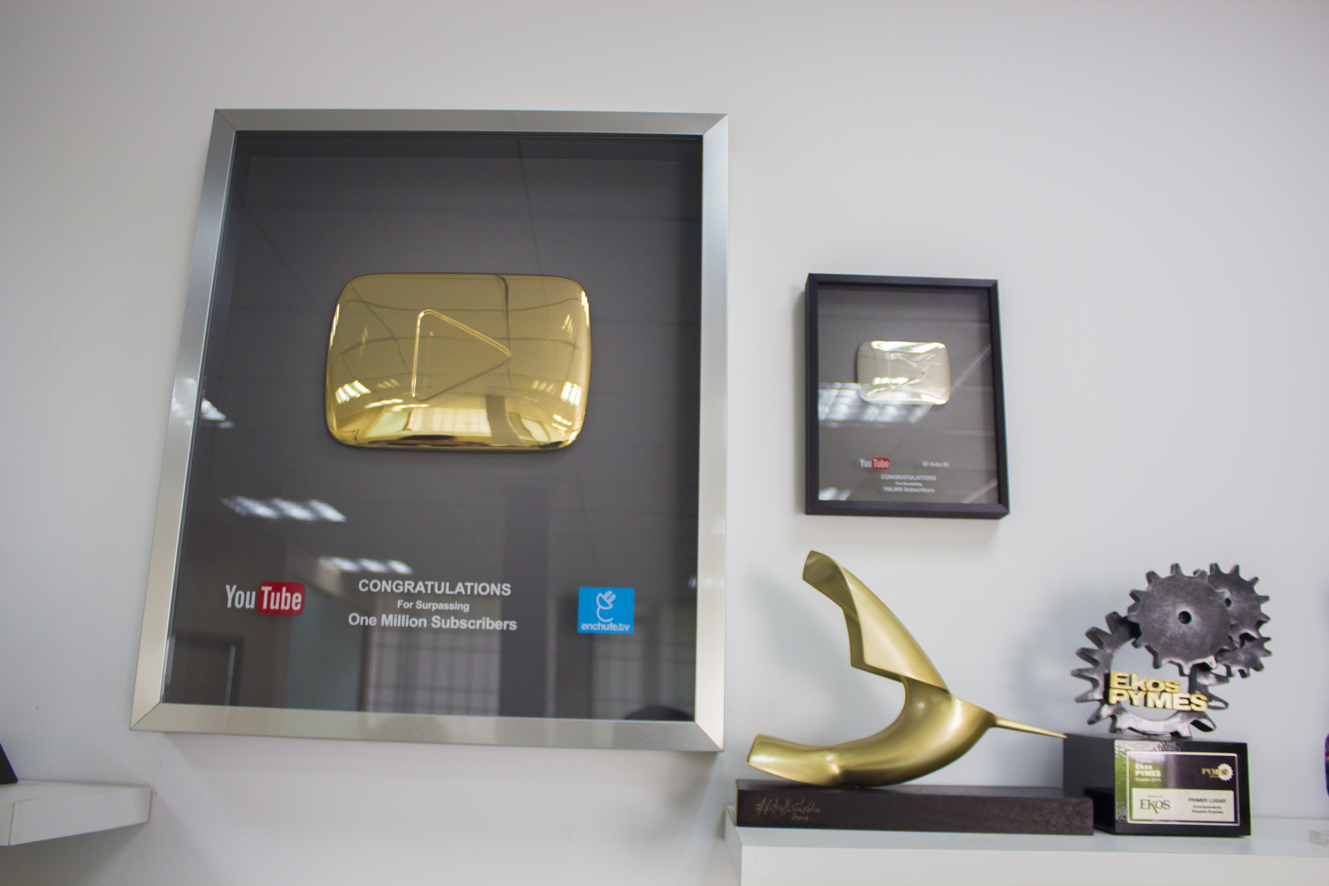 Botón de Oro de YouTube para Enchufe.tv por alcanzar el primer millón de suscriptores, junto al botón de plata de Aula 69, segundo canal de la productora TouchéFilms, y varios reconocimientos como el Premio Colibrí, entre otros.